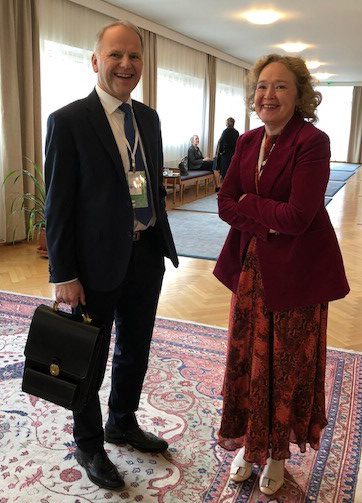 ©Aapo Riihimäki/valtioneuvoston kanslia